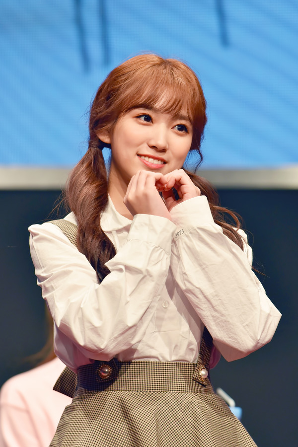 181110 아이즈원 팬사인회